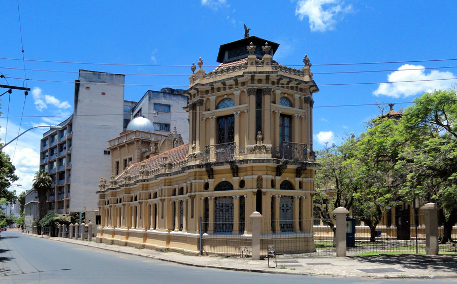 Castelinho, um prédio histórico da Universidade Federal do Rio Grande do Sul, Porto Alegre, Brasil.